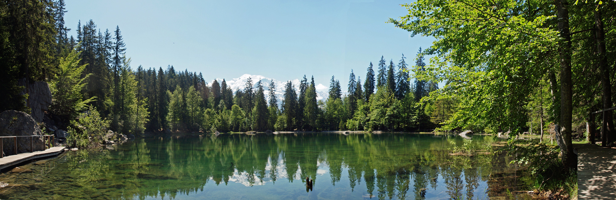 panorama du lac vert et mont blanc, passy haute-savoie france